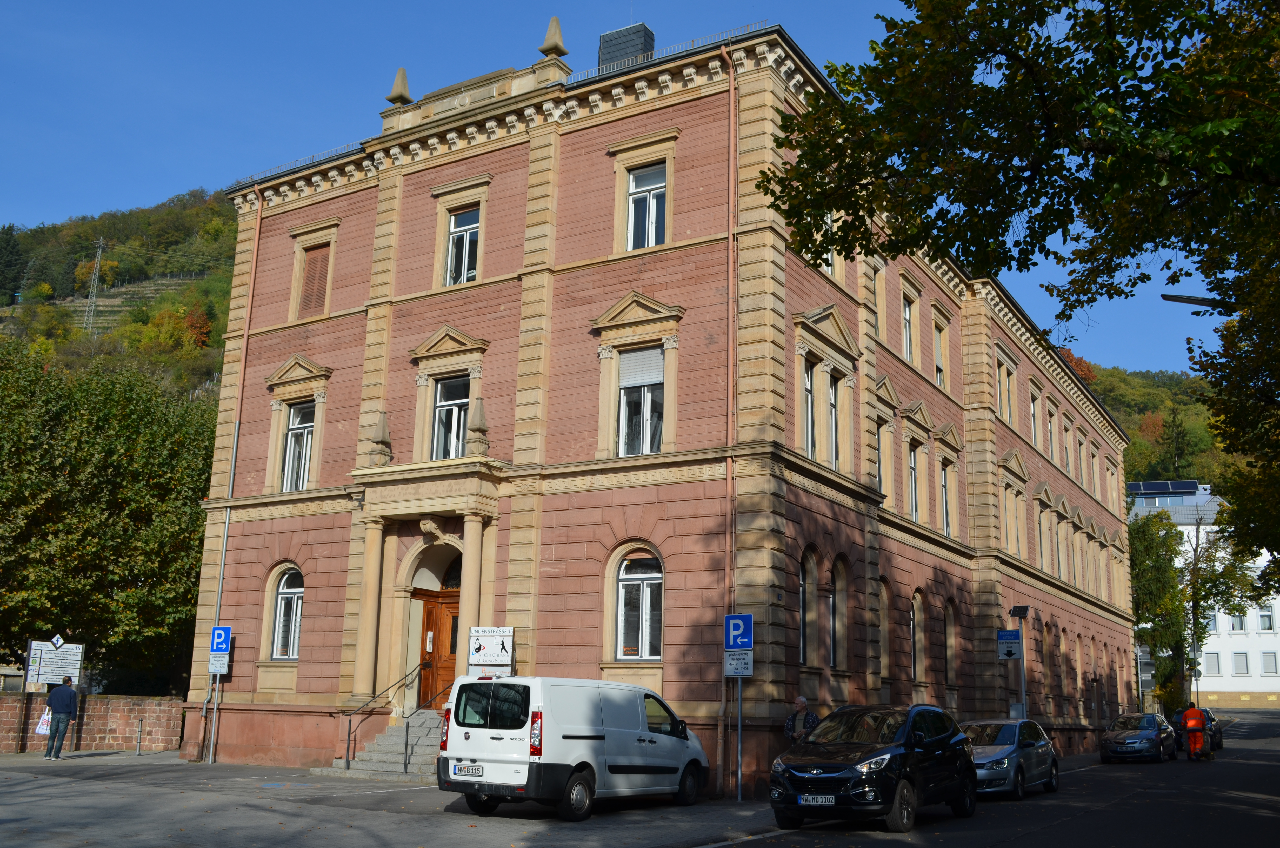 Lindenstraße 15 in Neustadt an der Weinstraße: ehemaliges Amtsgericht und Gefängnis; großvolumiger dreigeschossiger Walmdachbau, Renaissancemotive, 1899/1900, Erweiterung 1914